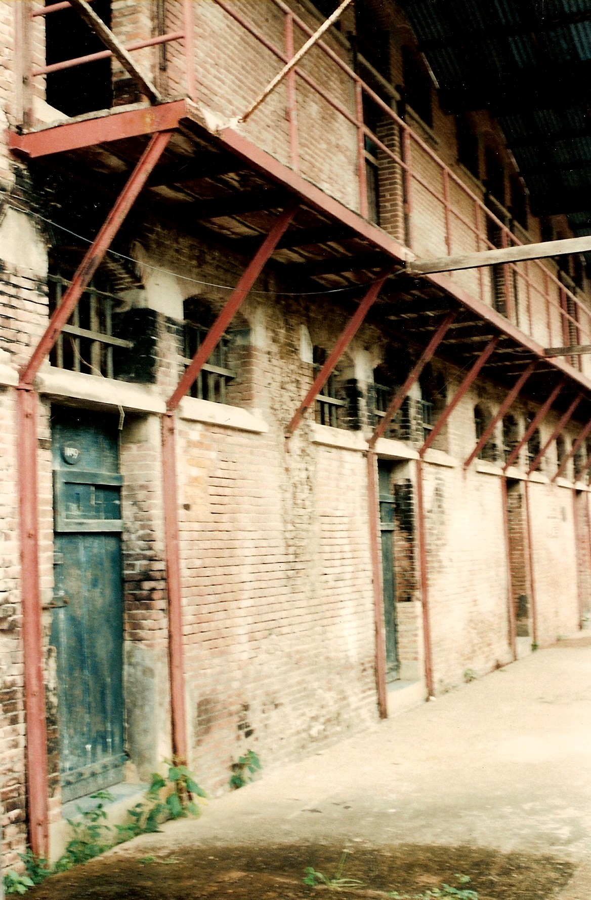 Nieuw-Amsterdam, Suriname. Voormalige gevangenis